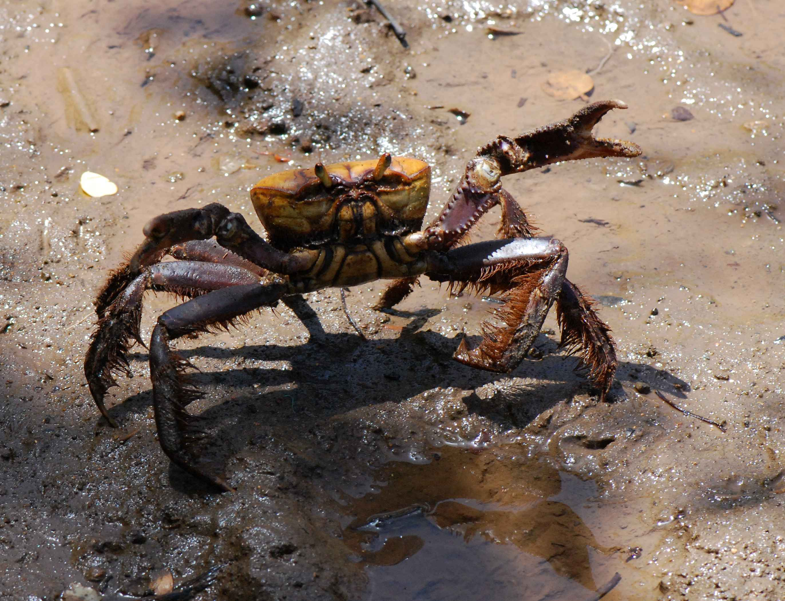 Ucides cordatus, crabe mantou, Martinique, mangrove de la Caravelle